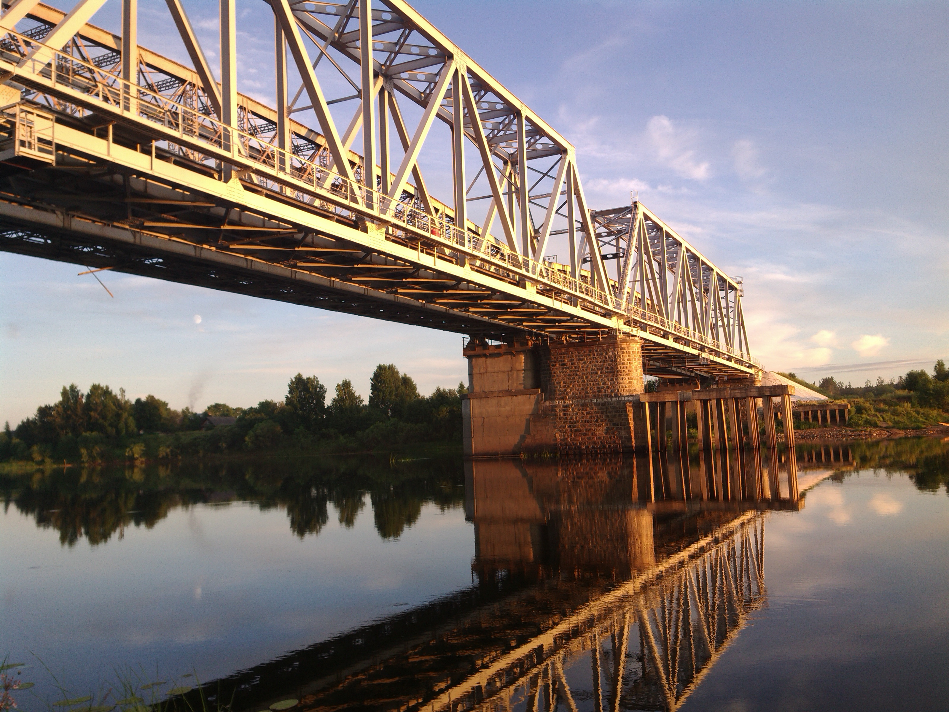 Luza, Kirov Oblast, Russia